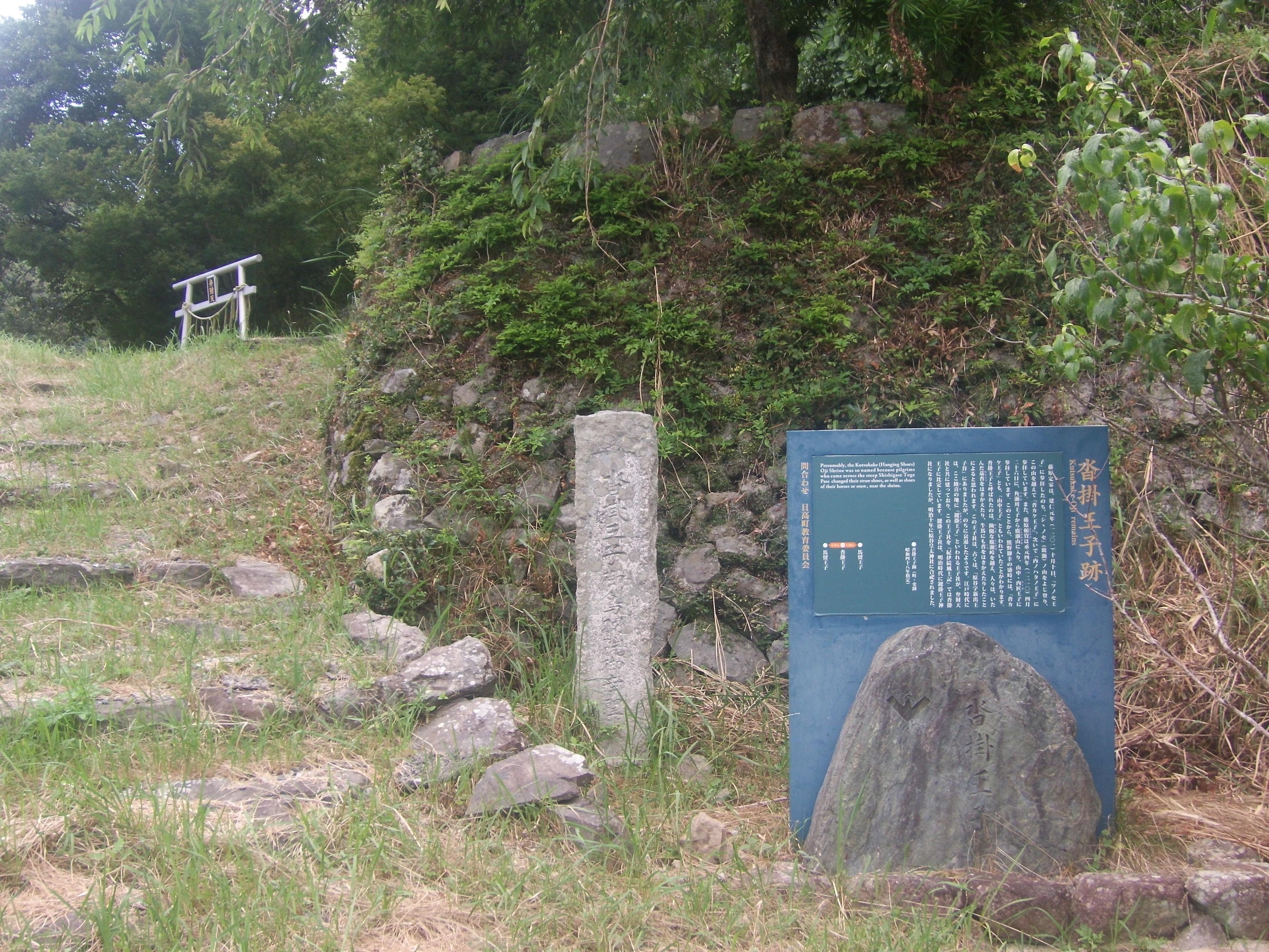 熊野古道・紀伊路の九十九王子の一つ沓掛王子(和歌山県日高町）